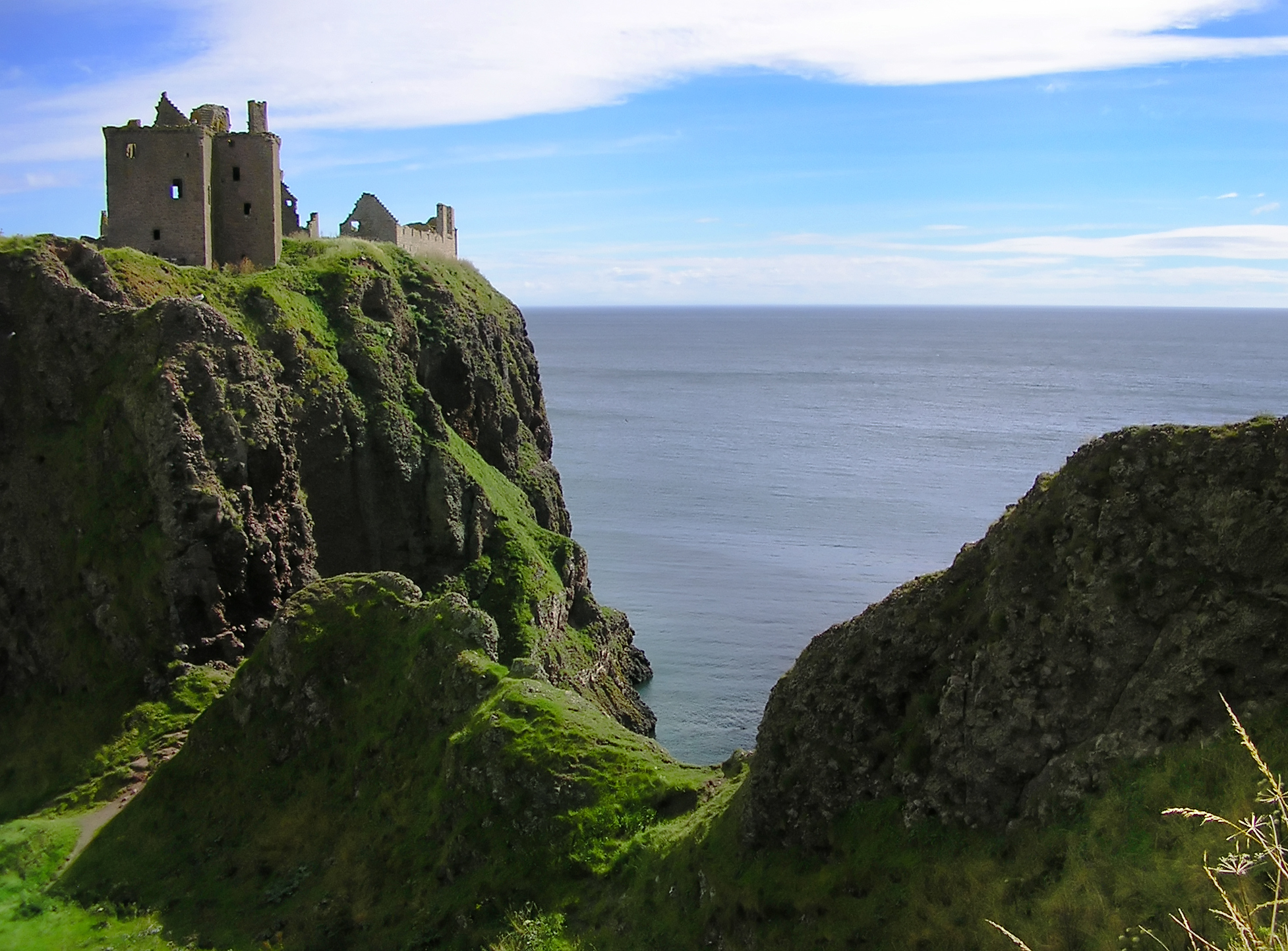 Dunnottar Castle